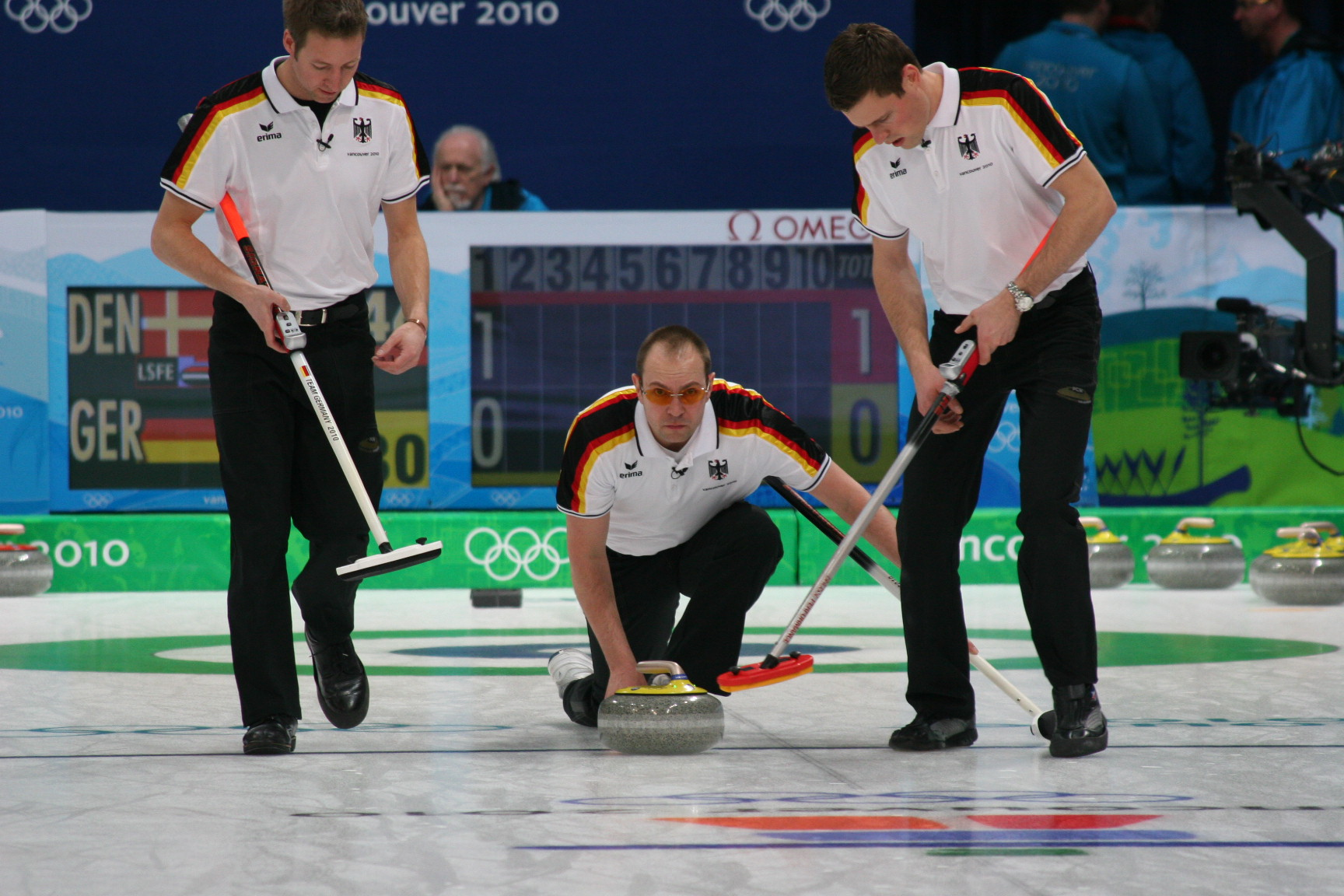 Holger Höhne bei der Steinabgabe.